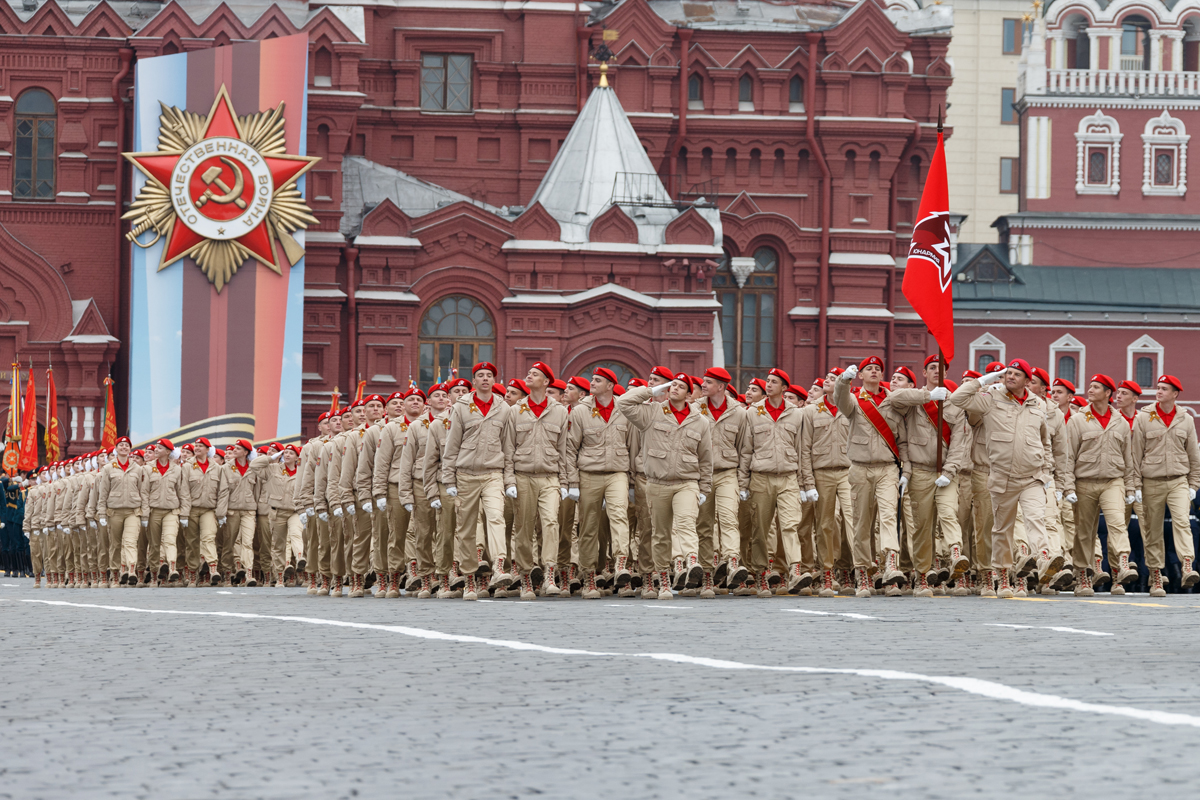 В Москве прошел парад в честь 74-й годовщины Победы в Великой Отечественной войне